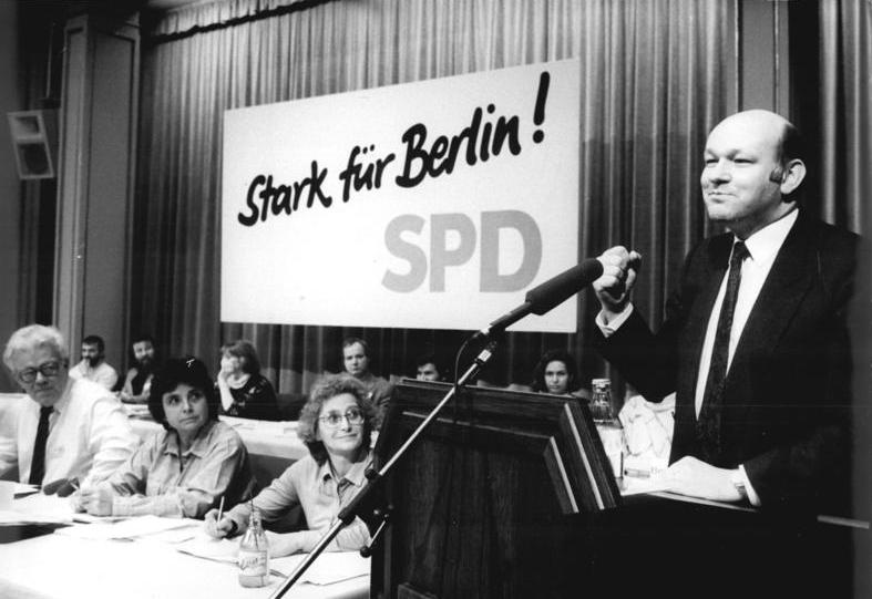 ADN-ZB-Franke-3.2.90-zei- Berlin: SPD-Bezirksparteitag-Zur Frage der deutschen Einheit nahm der Regierende Bürgermeister von Berlin (West), Walter Momper, Stellung. Nach seiner Meinung komme die Einheit beider deutscher Staaten möglicherweise noch schneller als jetzt erwartet.